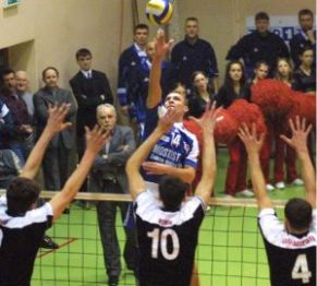 Mostostal vs Czarni Radom. 2000-01 season